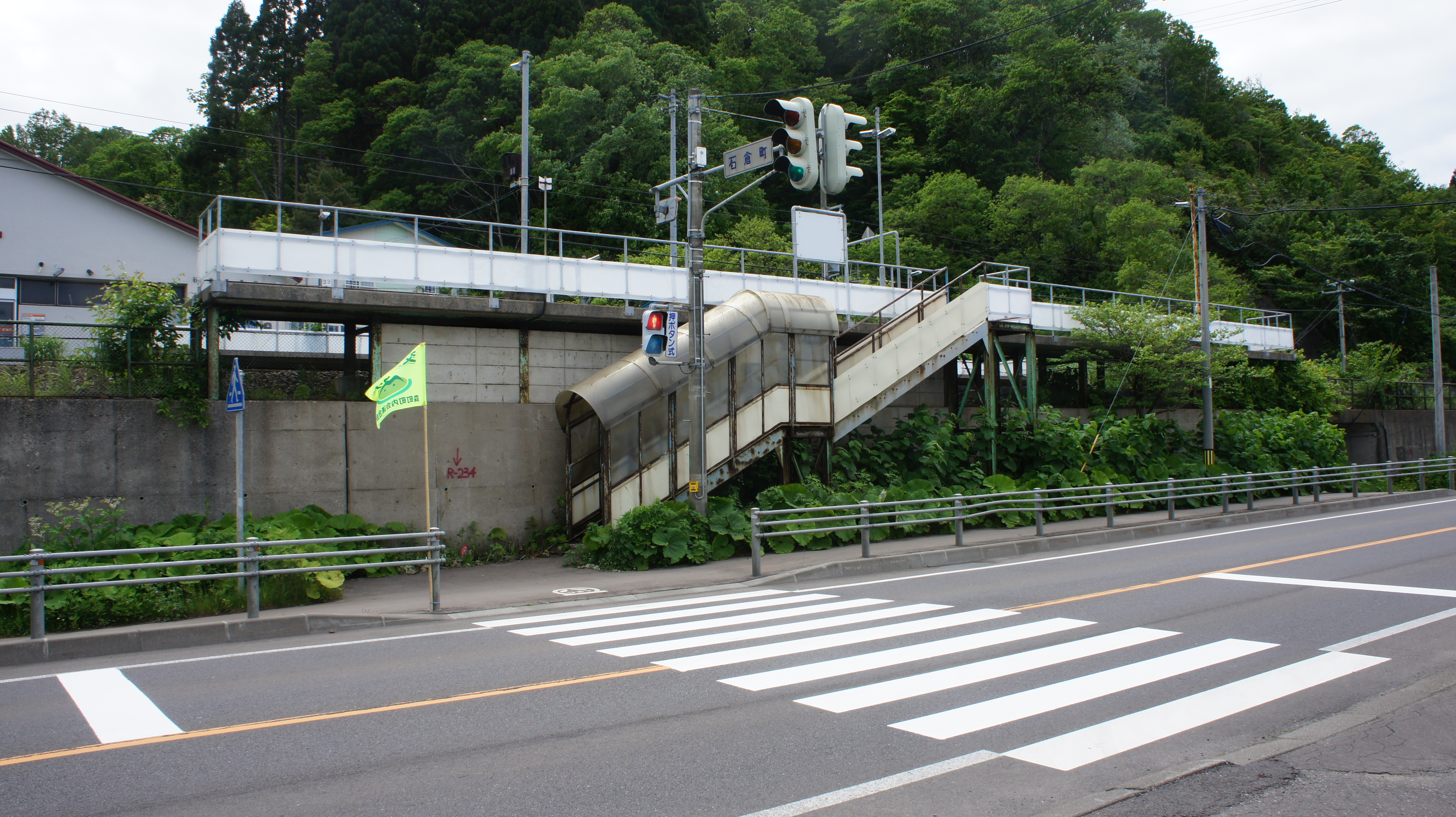 JR函館本線・本石倉駅外観